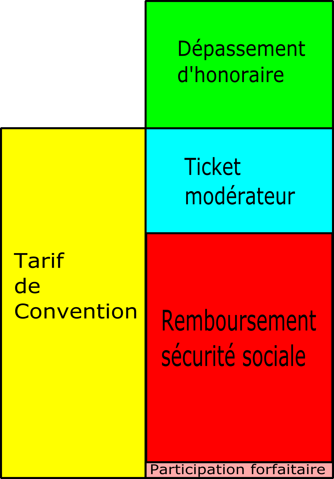 syntèse des remboursement de la sécurité sociale. par exemple Une consultation chez le généraliste payé 30 €: le tarif de convention est à 22 €. 15.40€ - 1 € sont remboursé par la sécurité sociale soit 70% du TC. Le ticket modérateur est de 6.60€ et il y a 8€ de dépassement d'honoraire.